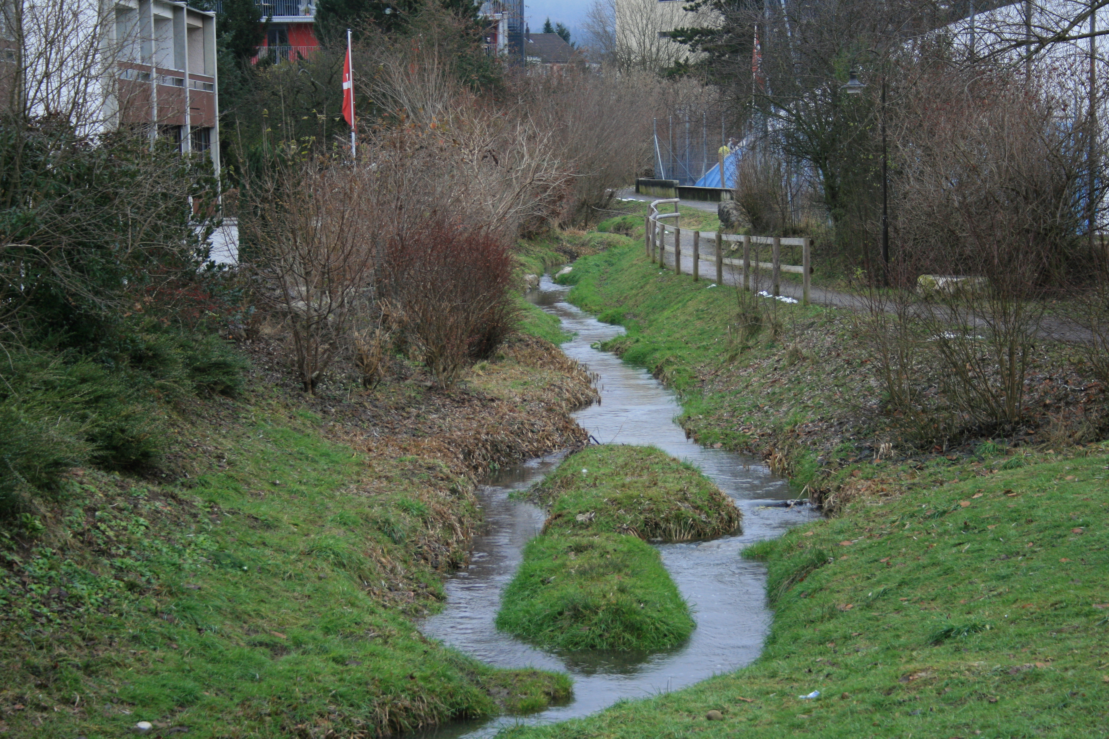 Gottesgraben (renaturiert) in Wettingen, Schweiz